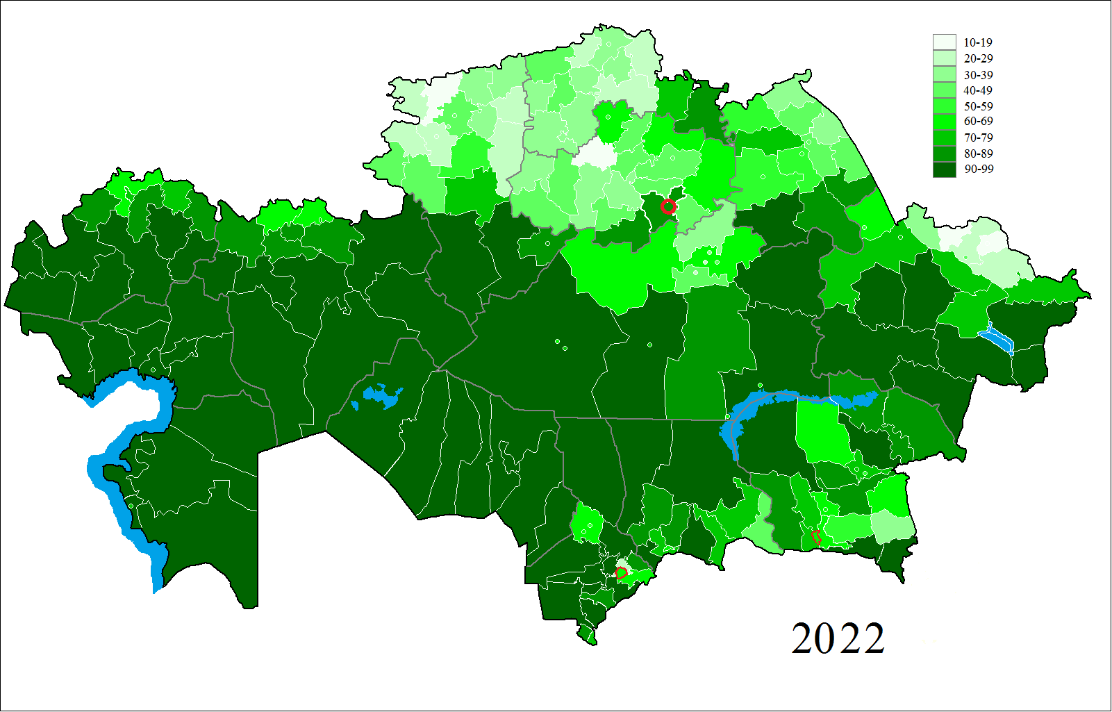 Доля казахов в Казахстане по районам и городам областного и республиканского подчинения на начало 2018 года